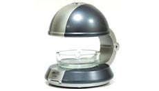 Purificateur d'air par Ionisation